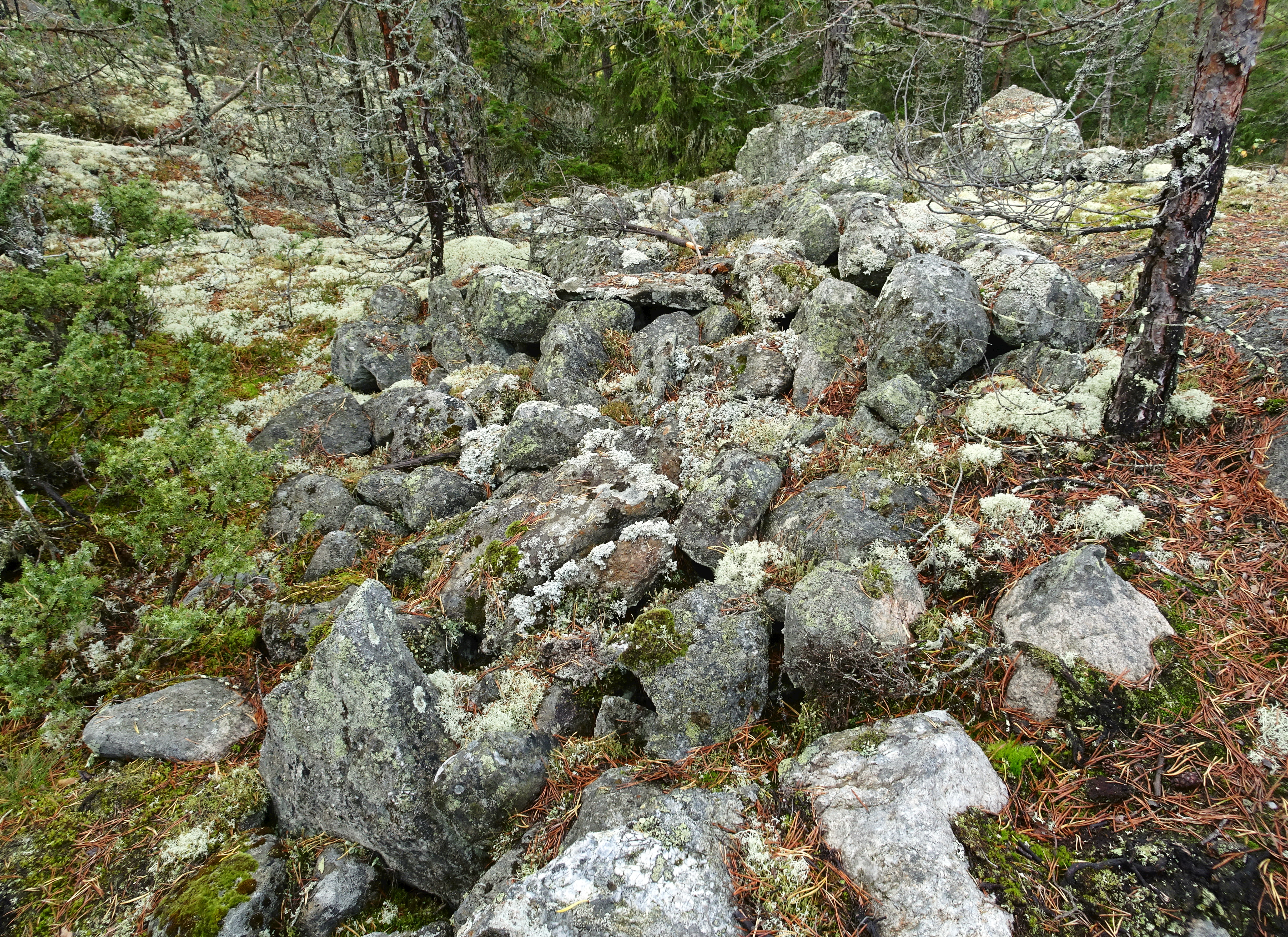 Gålö fornstig. fornborg (RAÄ-nummer Österhaninge 23:1)